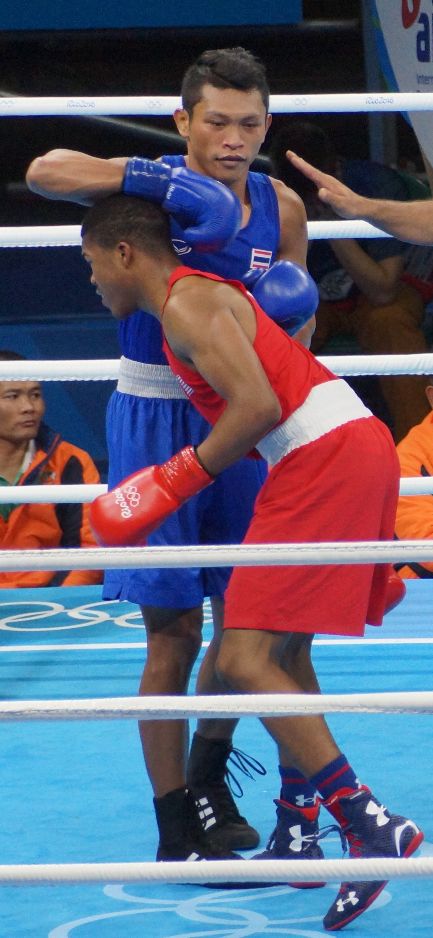 slt.a-77